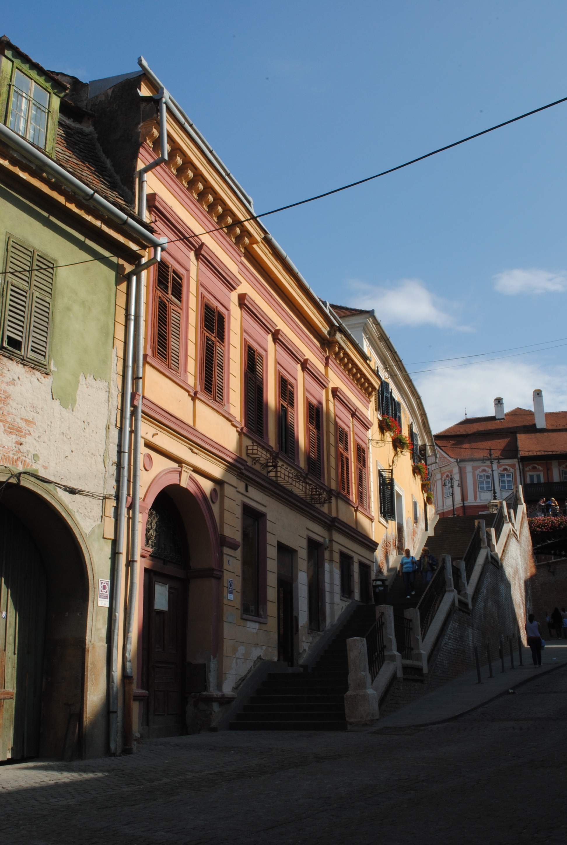 Casă, sec. XVIII